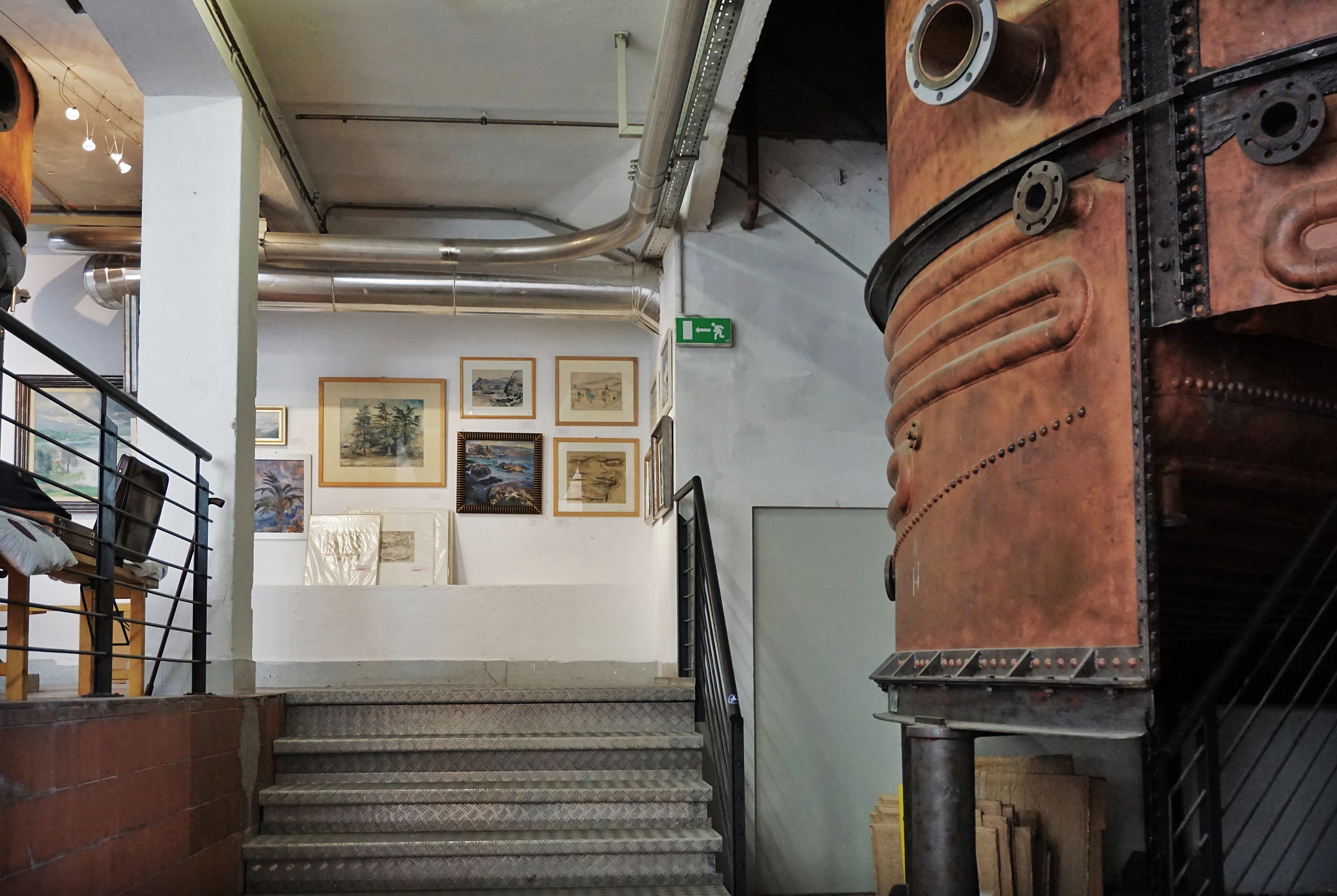 KunsthausSudhaus Villach: Ausstellung Ludwig Heinrich Jungnickel 2016/2017